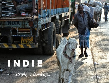 Výherní fotokniha soutěže CFK roku 2015